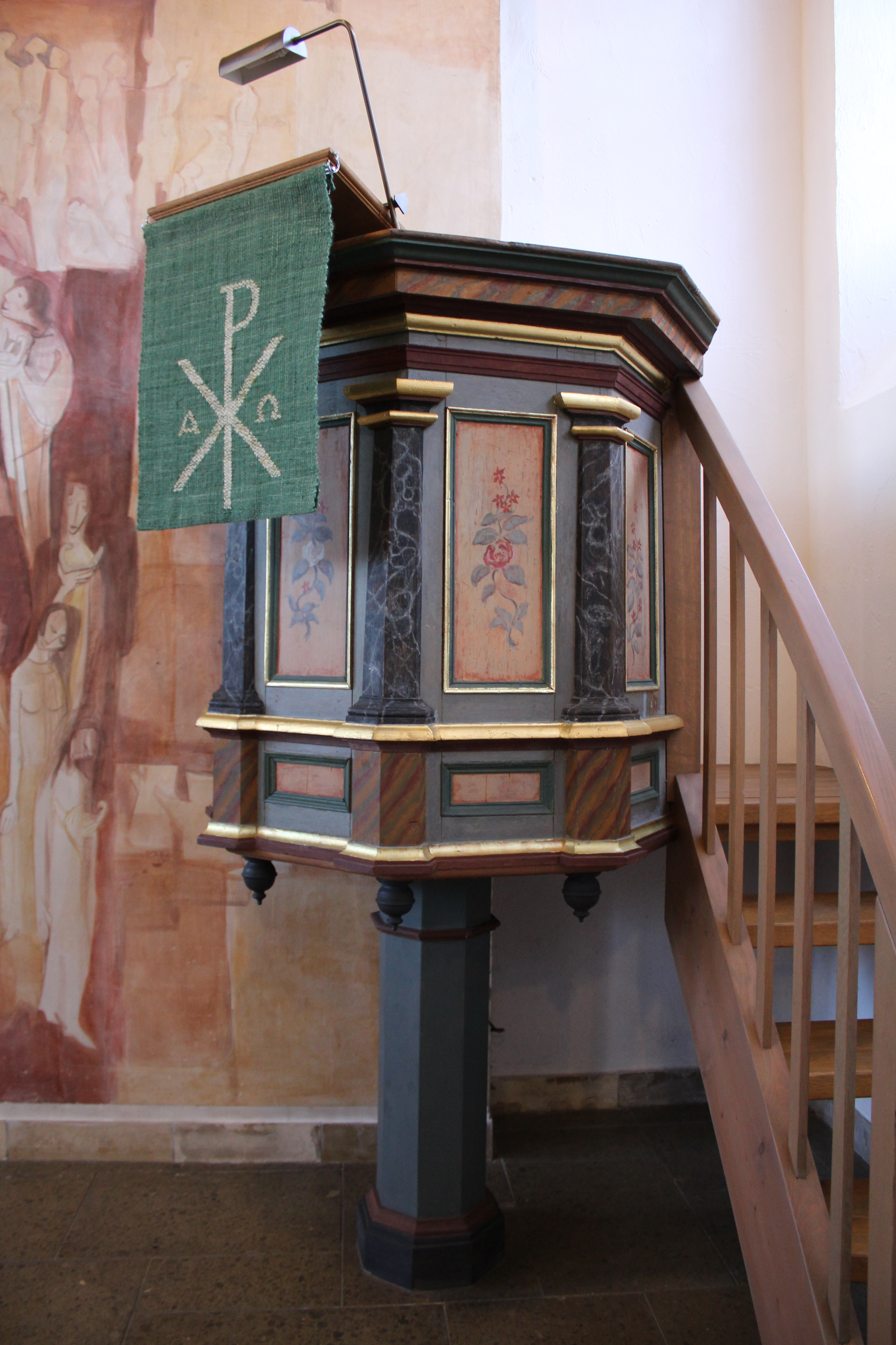 Evangelische Kirche Leidenhofen, Gemeinde Ebsdorfergrund, Landkreis Marburg-Biedenkopf, Hessen, Deutschland